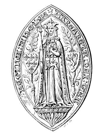 Pečeť Markéty Francouzské